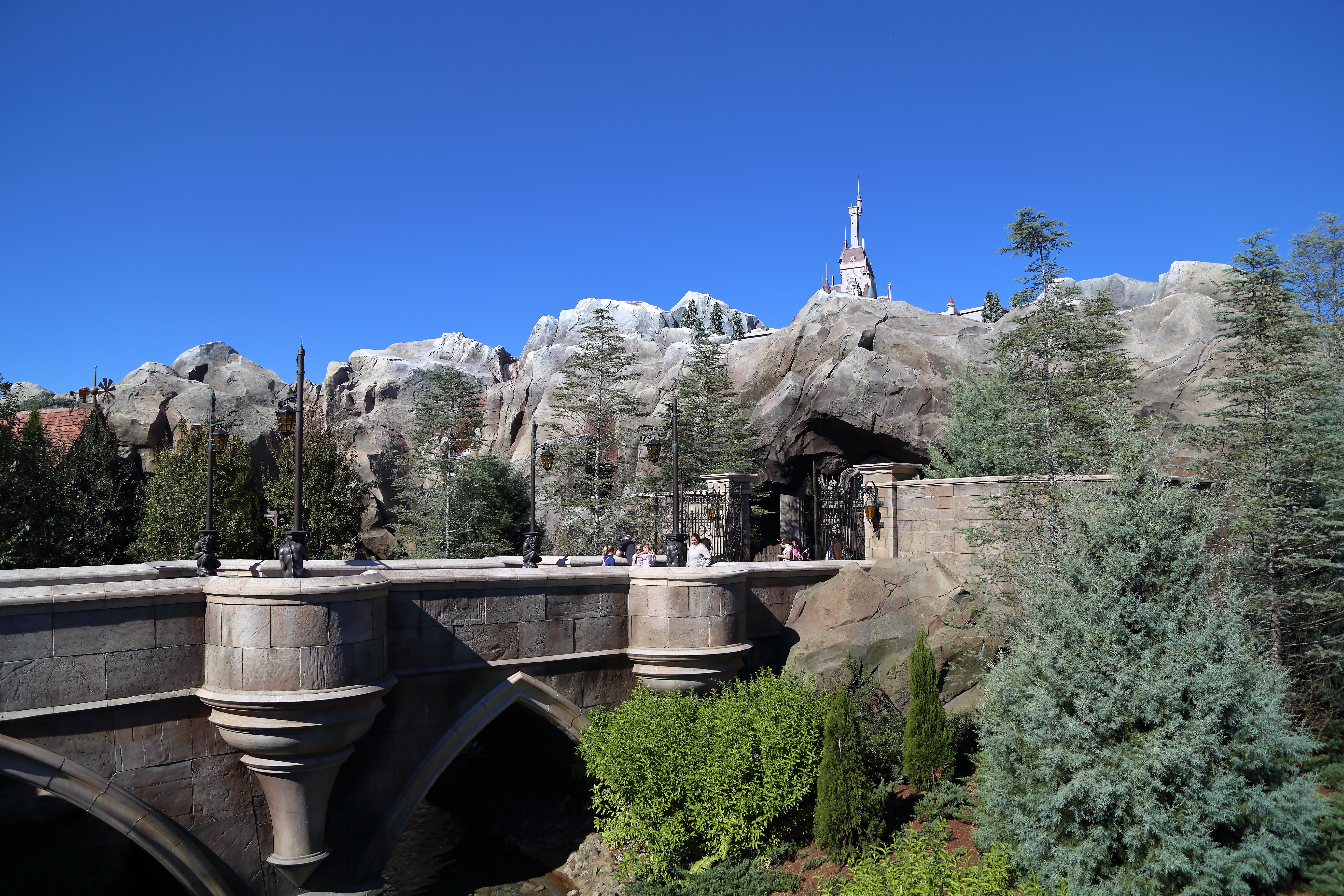 "Be Our Guest" Restaurant Entrance